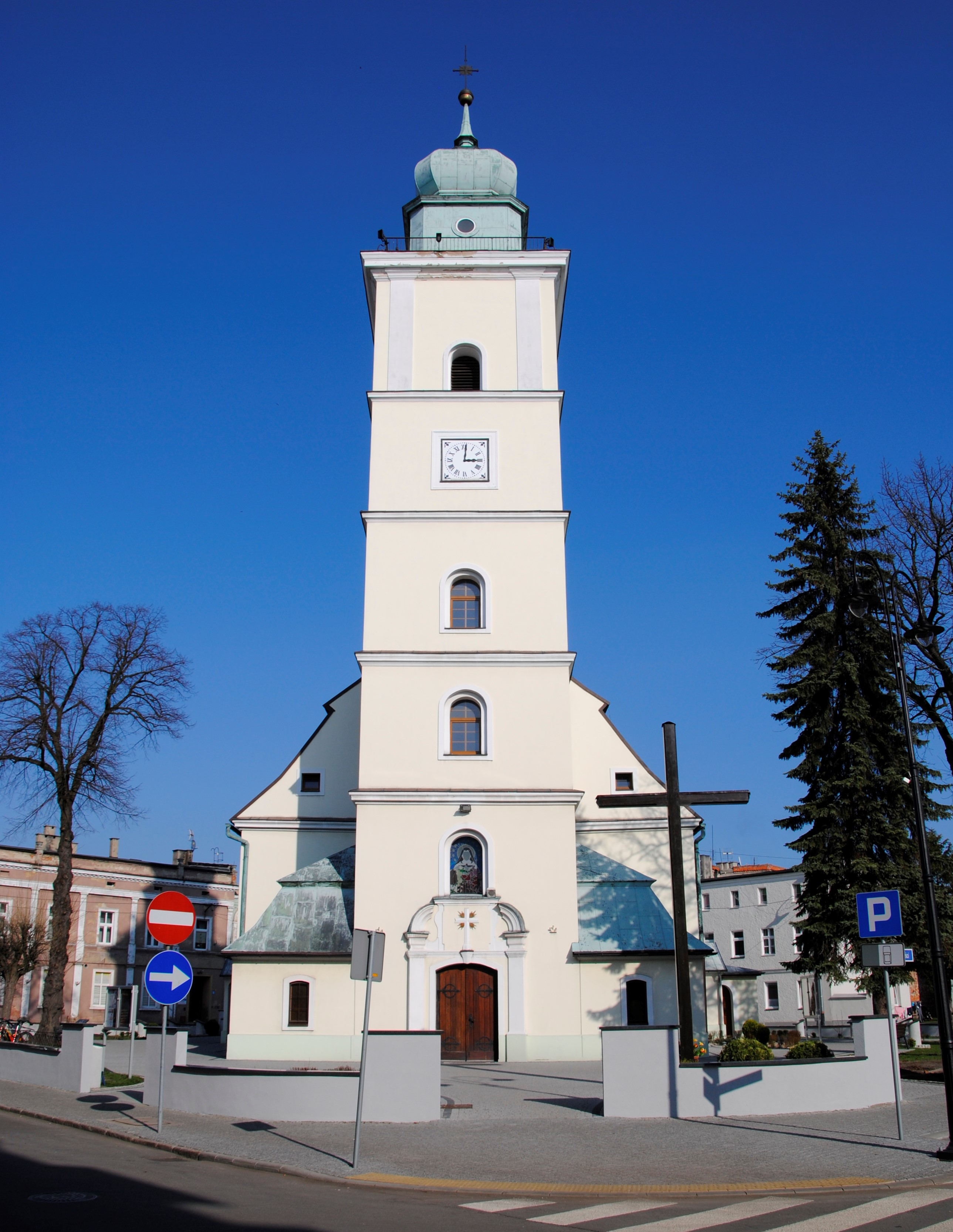 Theresia-von-Lisieux-Kirche in Konstadt Oberschlesien